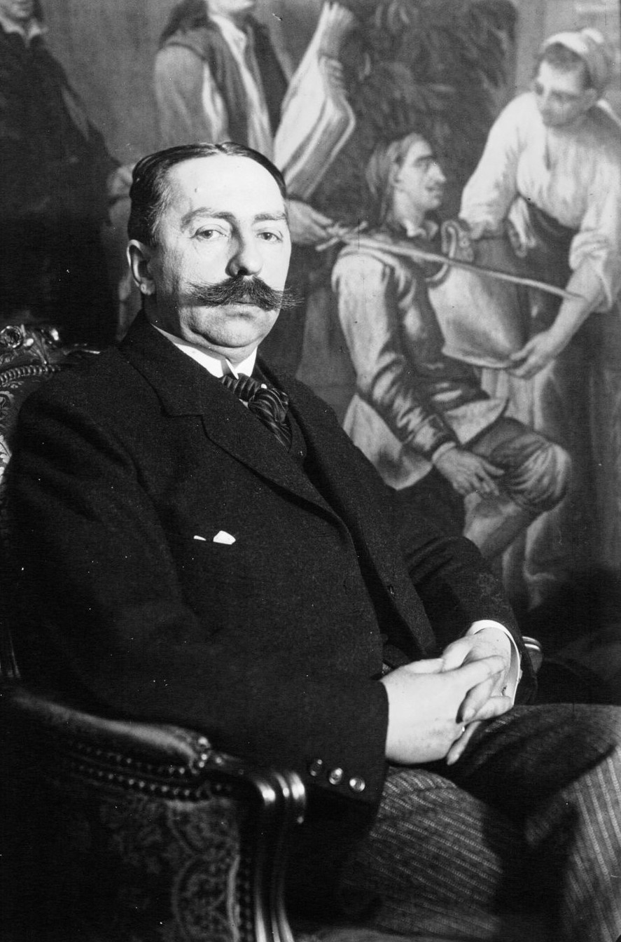 Jacques III de Bourbon (1870-1931).